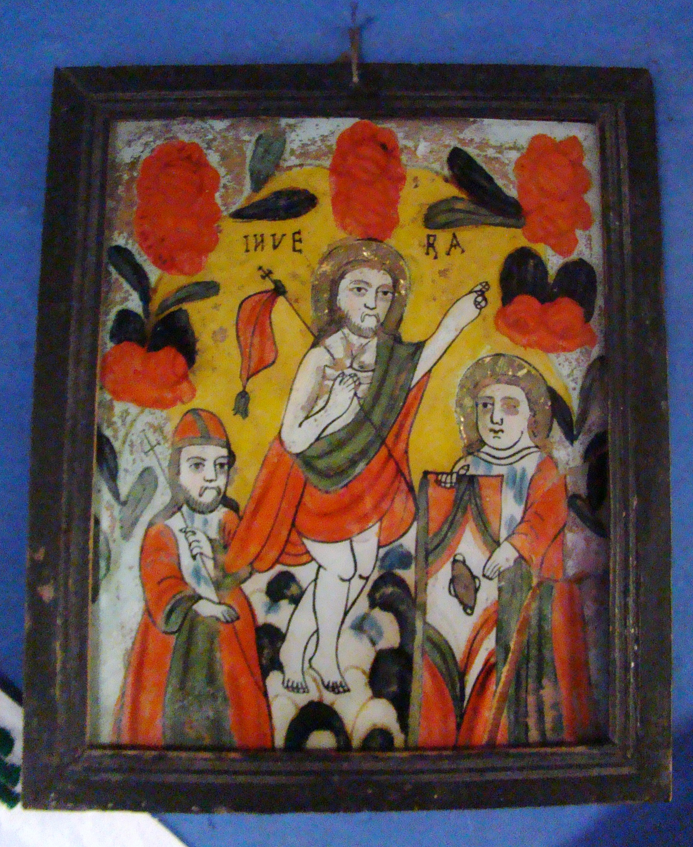 Biserica de lemn "Sfinții Împăraţi" din Aspra